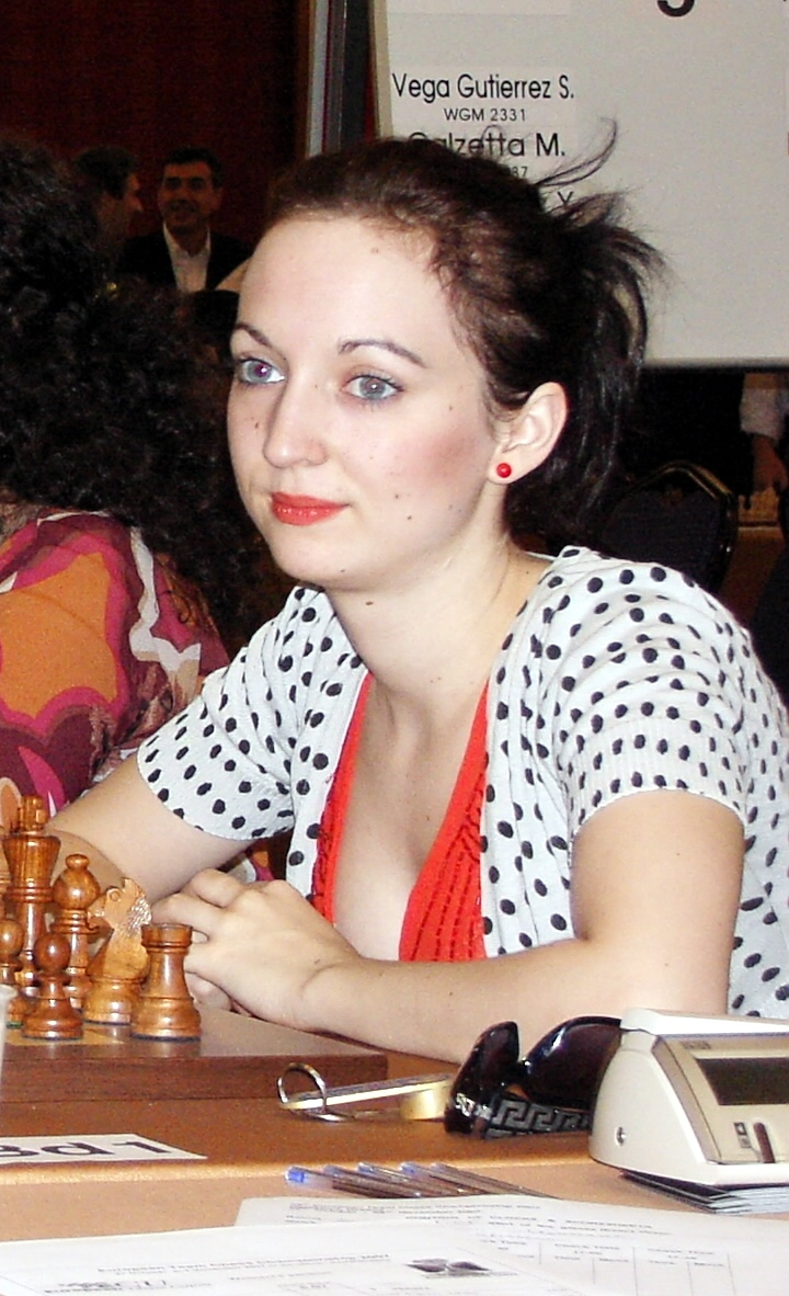 WGM Elisabeth Pähtz Germany, EuroChessIraklion 2007